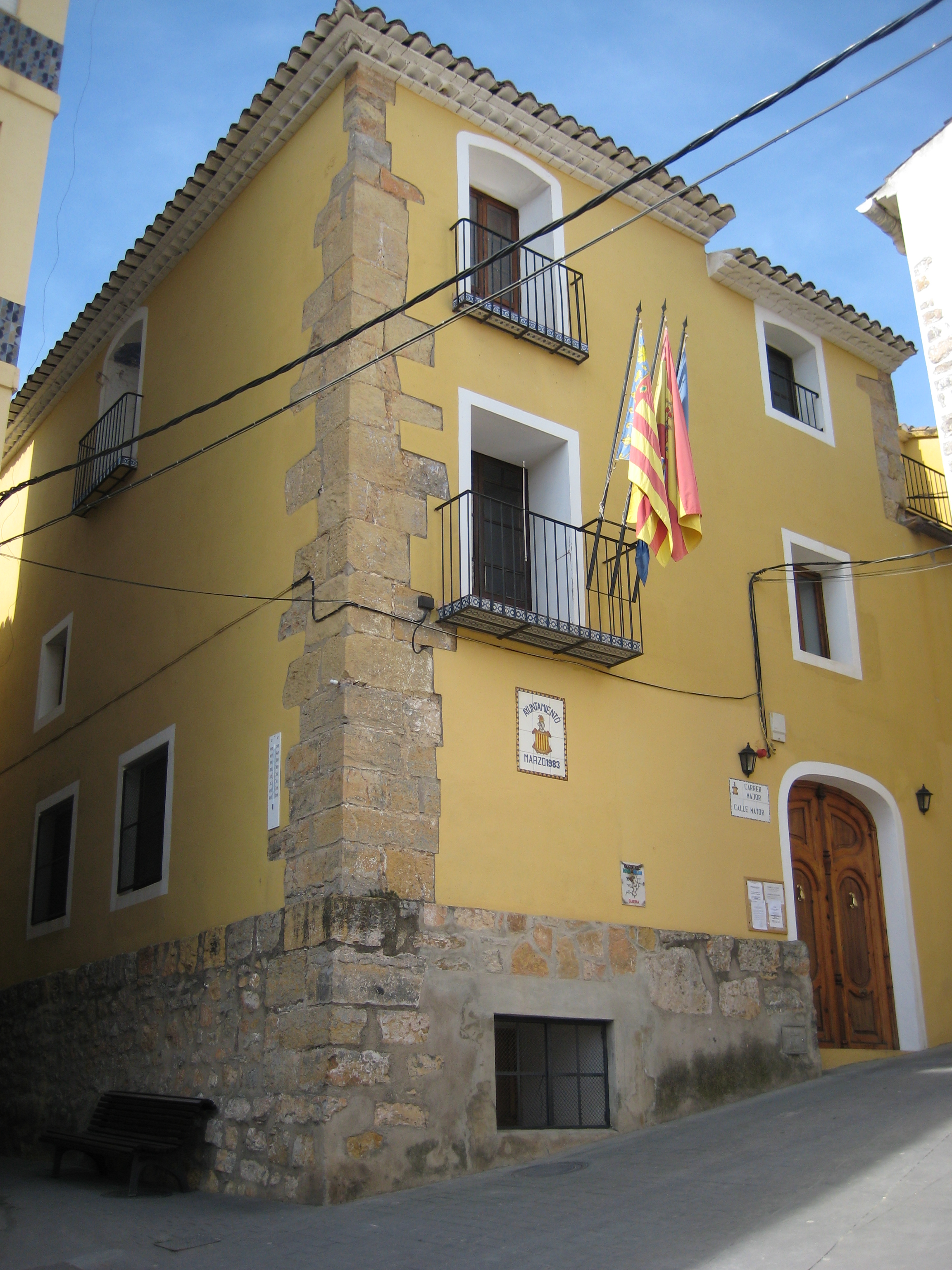 Ajuntament de Suera (Plana Baixa)